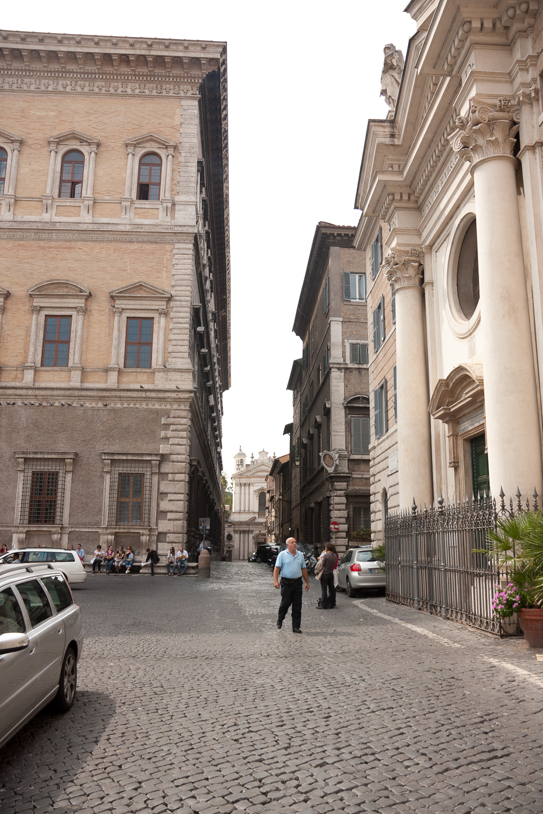 Roma, piazza Farnese, via dei Farnesi. A destra, Santa Birgitta